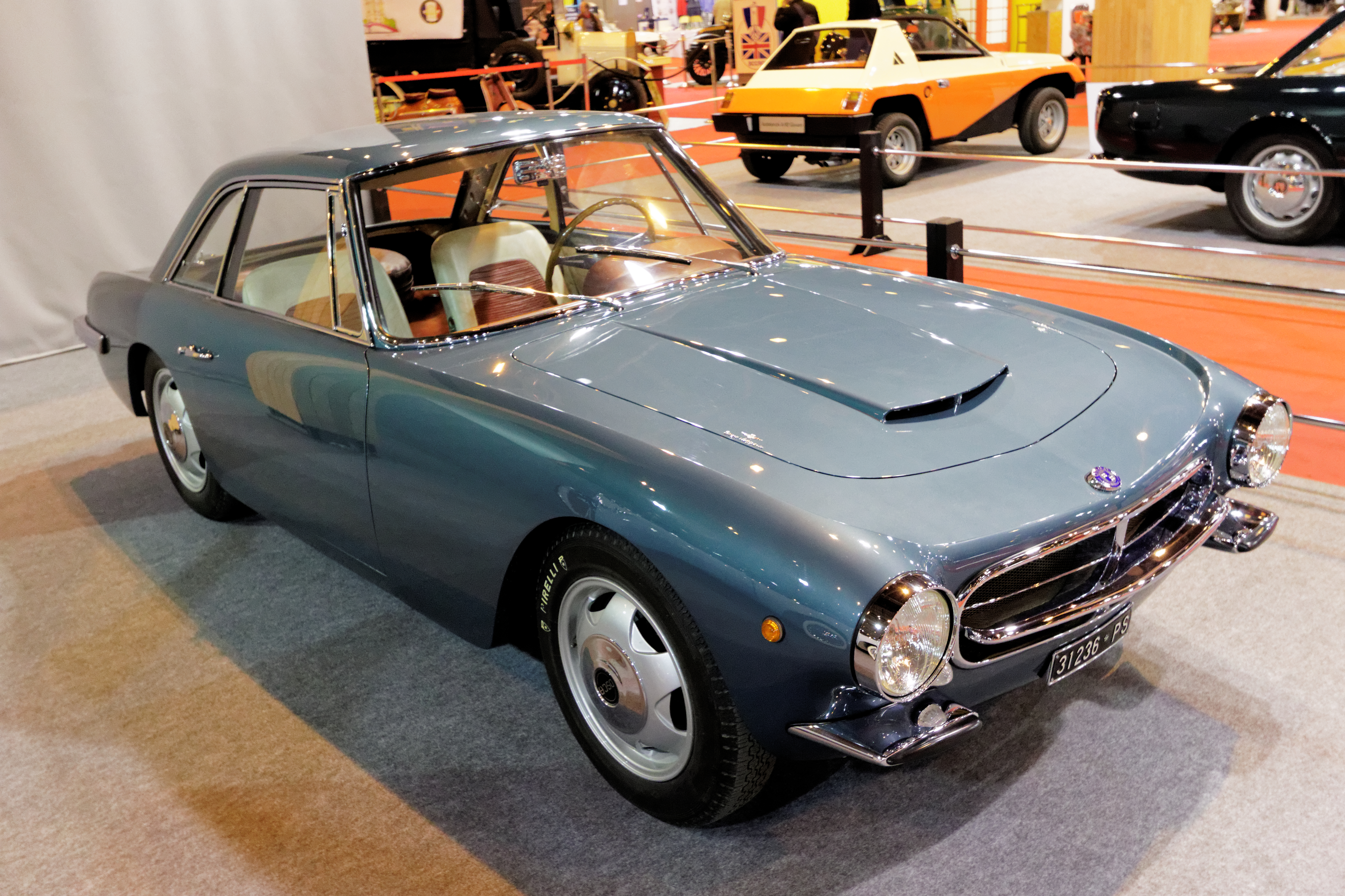 Une des voiture présentée lors du salon Rétromobile de Paris 2015